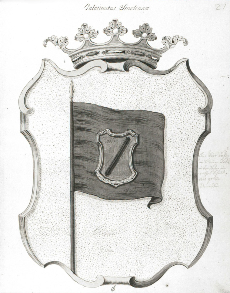 Беларуская (тарашкевіца): Герб Смаленскага ваяводзтва (Smalensk)